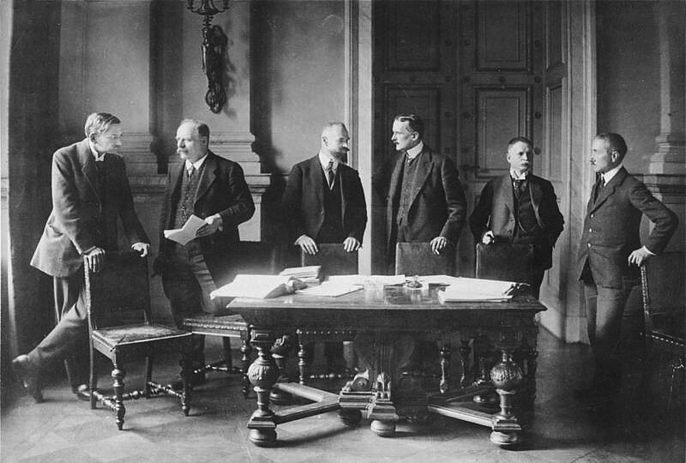 Die deutschen Friedens-Delegierten und Sachverständigen in Versailles. 1919: Die Mitglieder der für die Friedensverhandlungen in Paris bestimmten deutschen Delegation. (v.l.n.r.) Prof. Dr. Schücking, Reichspostminister Giesberts, Reichsjustizminister Dr. Landsberg, Reichsminister des Auswärtigen Dr. Graf Brockdorff-Rantzau, Präsident der Preussischen Landesversammlung Leinert, Dr. Karl Melchior.